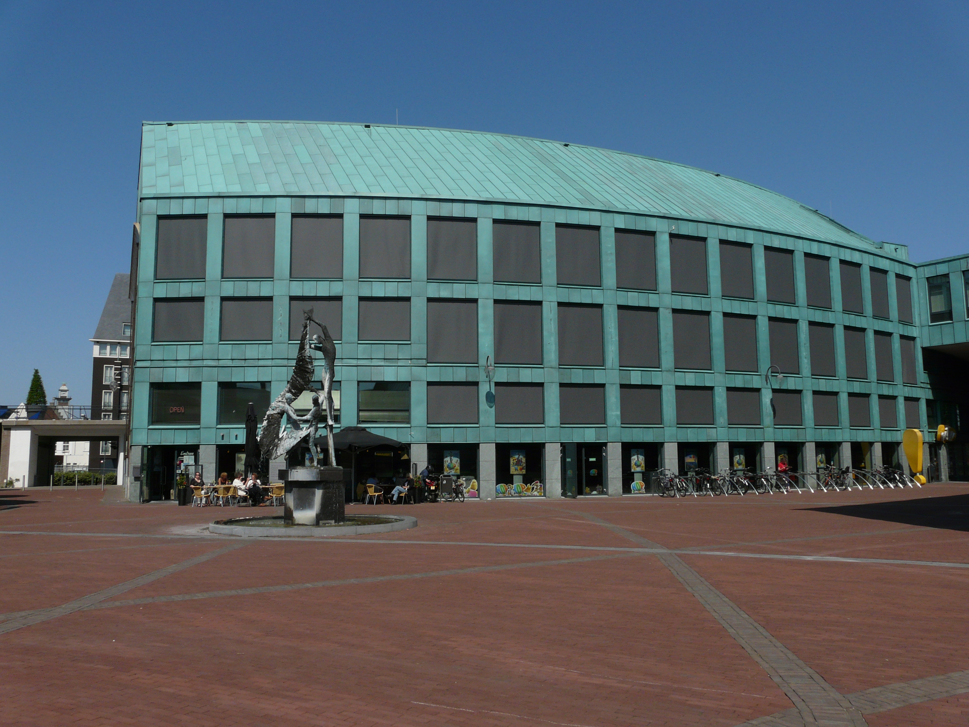 Pathe bioscoop in Helmond